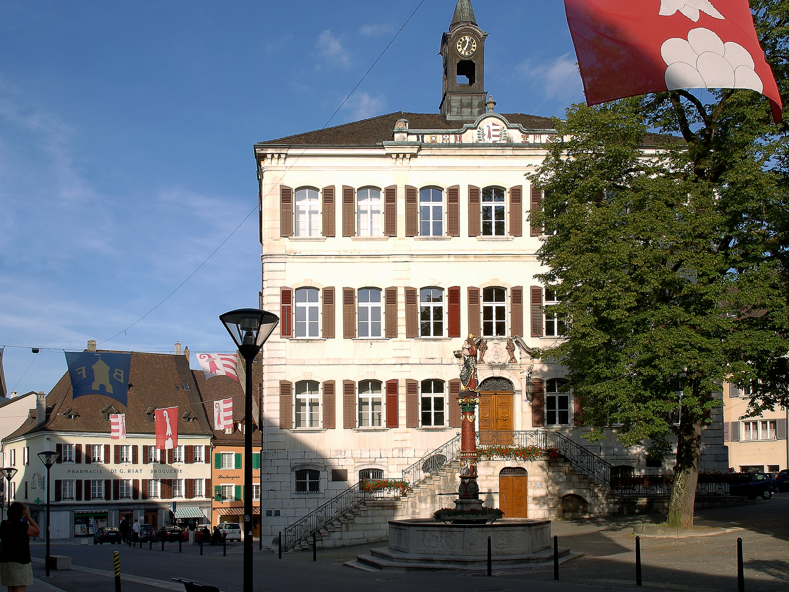 Delémont, Jura (Suisse) - Hôtel du gouvernement du Jura